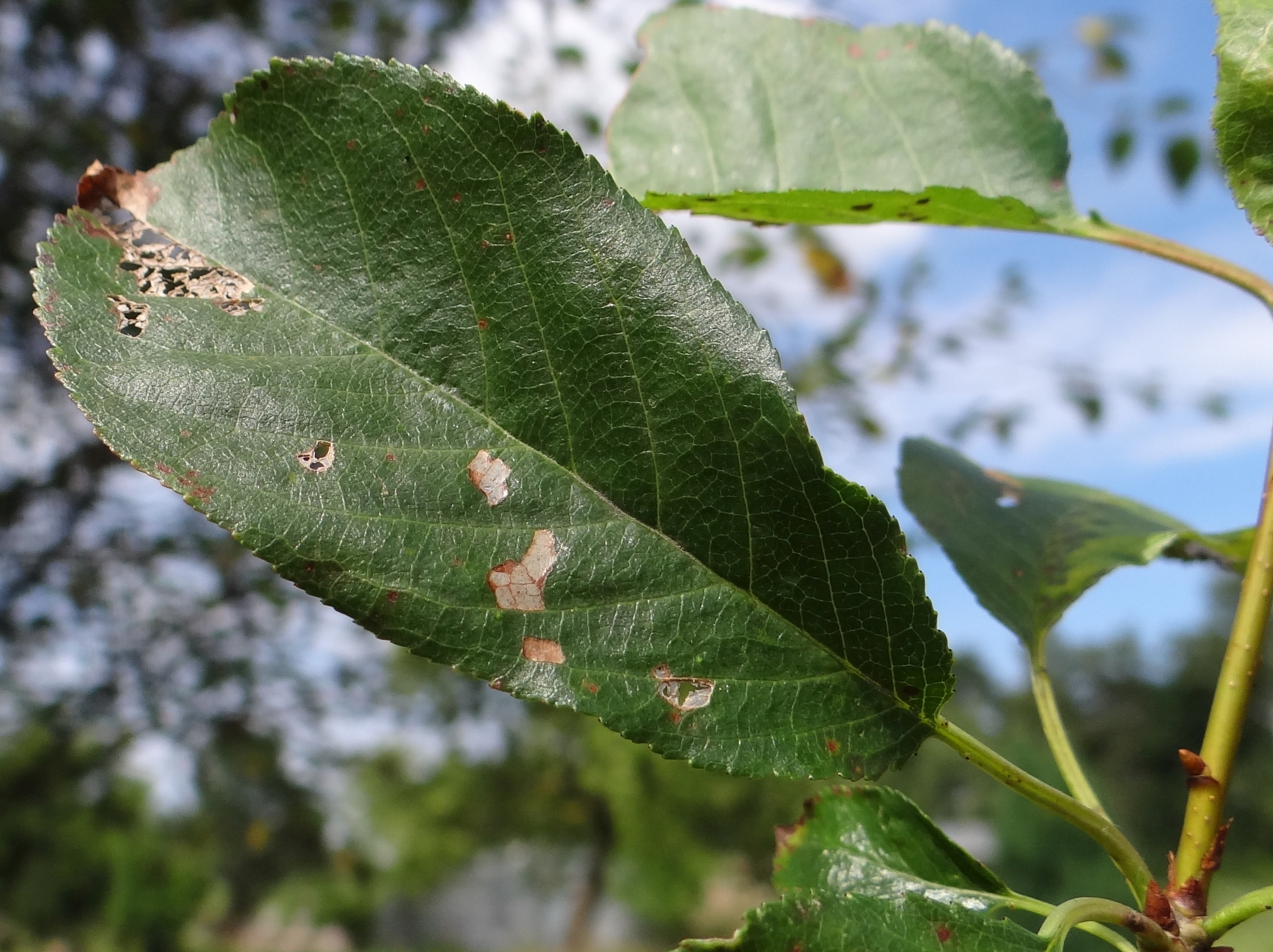 Stigmina carpophila on Cerasus vulgaris